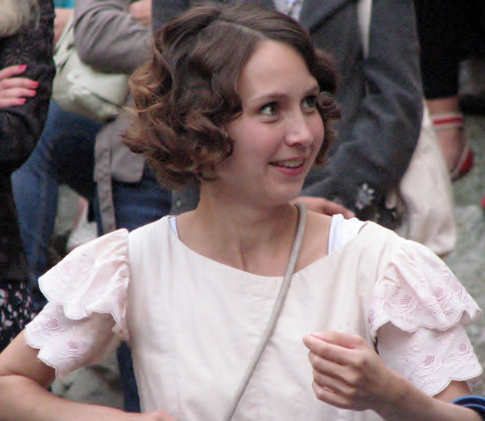 Ursula Ratasepp Tallinna Linnateatri 48. hooaja avamisel